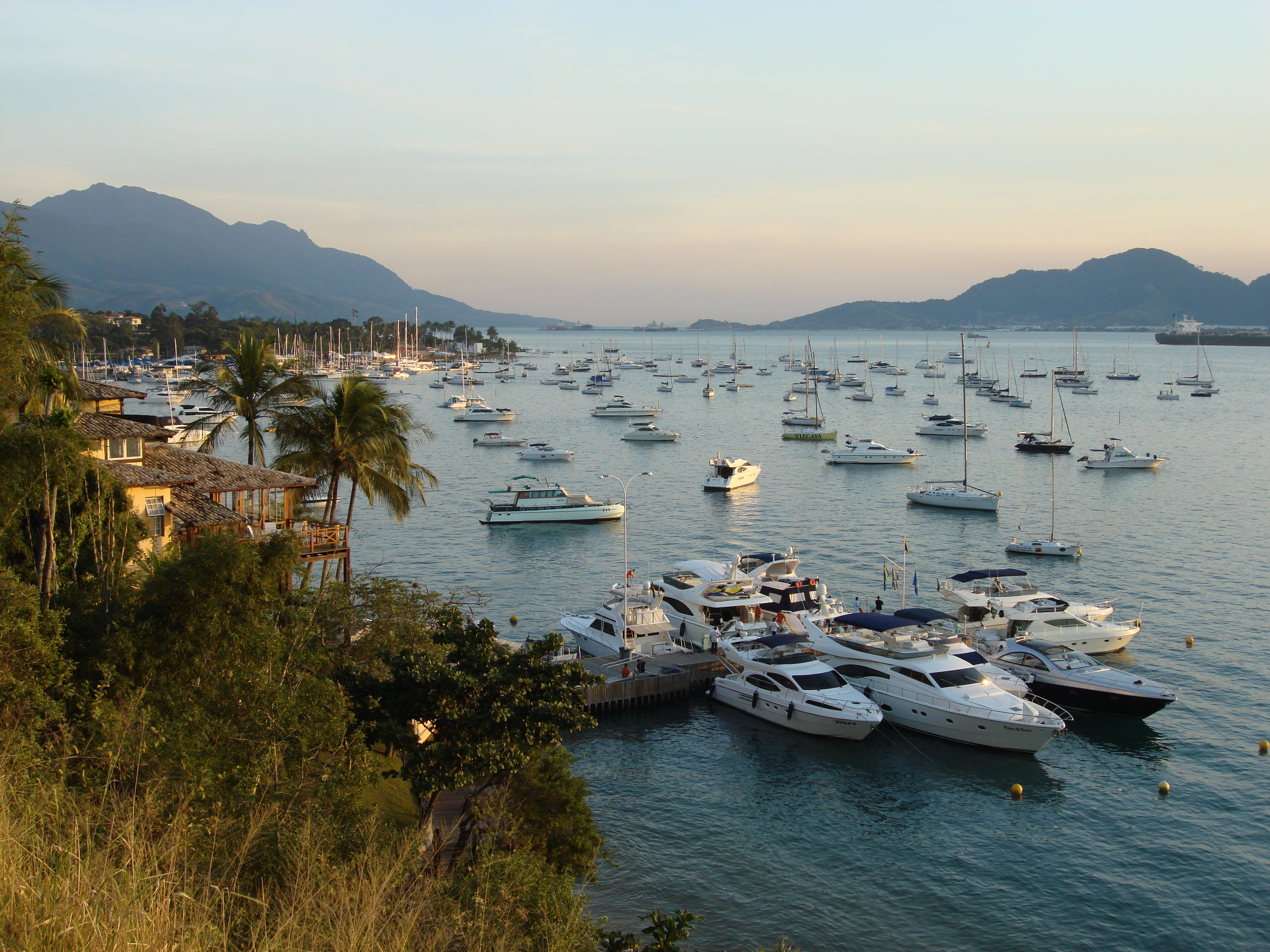 Ilhabela, São Paulo, Brasil